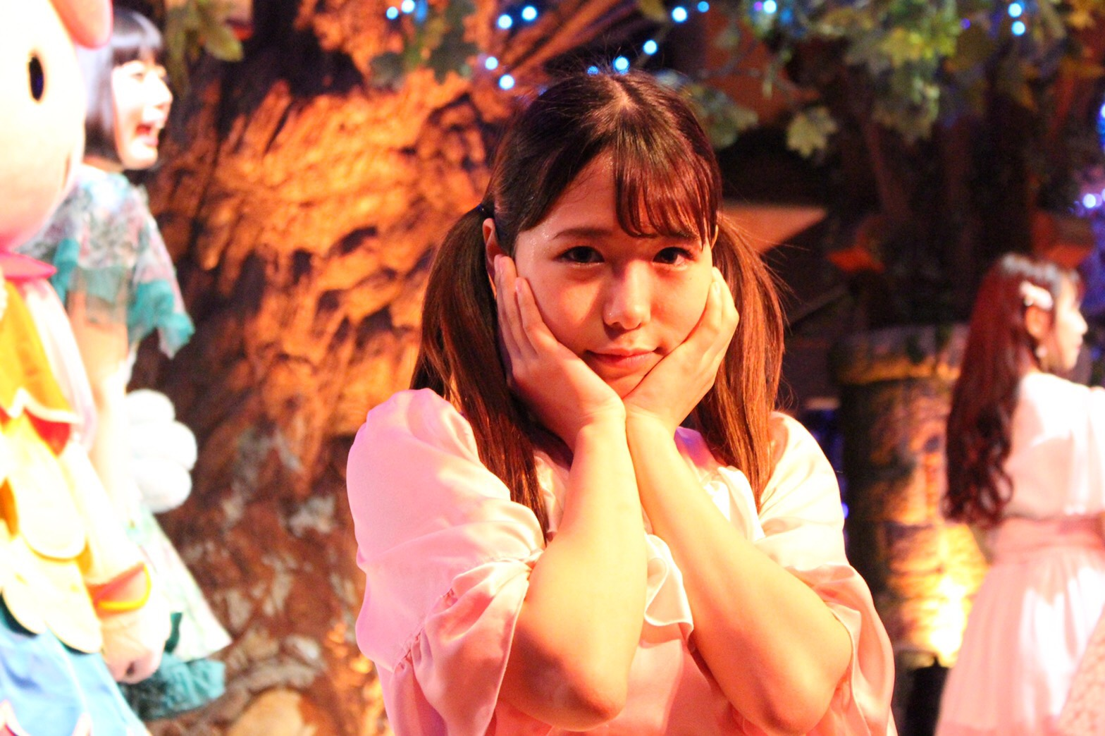 水城夢子の写真